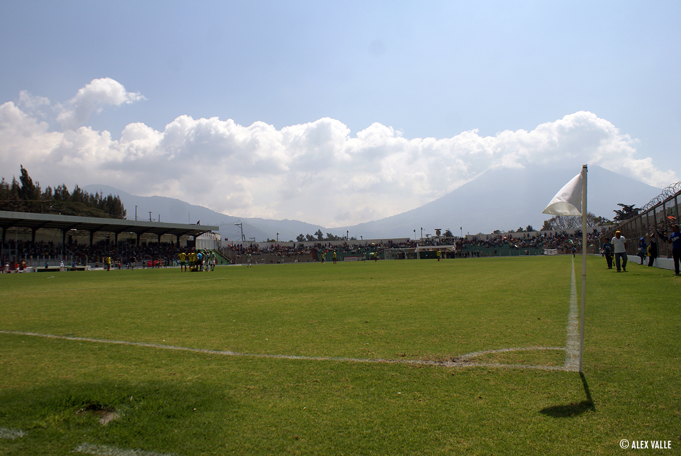 Estadio Pensativo de La Antigua Guatemala